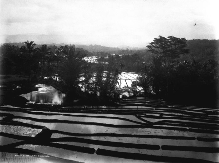 Foto. Sawahlandschap bij Priangan, Java